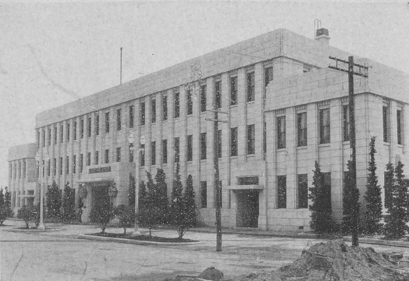 高岡電灯本社ビル。1934年建設で、後に「本丸会館」（本館）と呼ばれる建物。2012年解体。